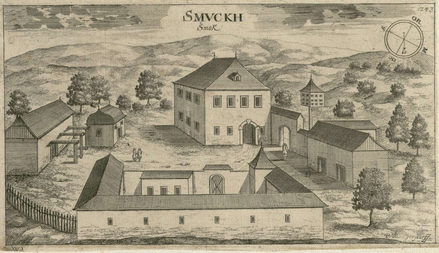 Dvorec Smuk